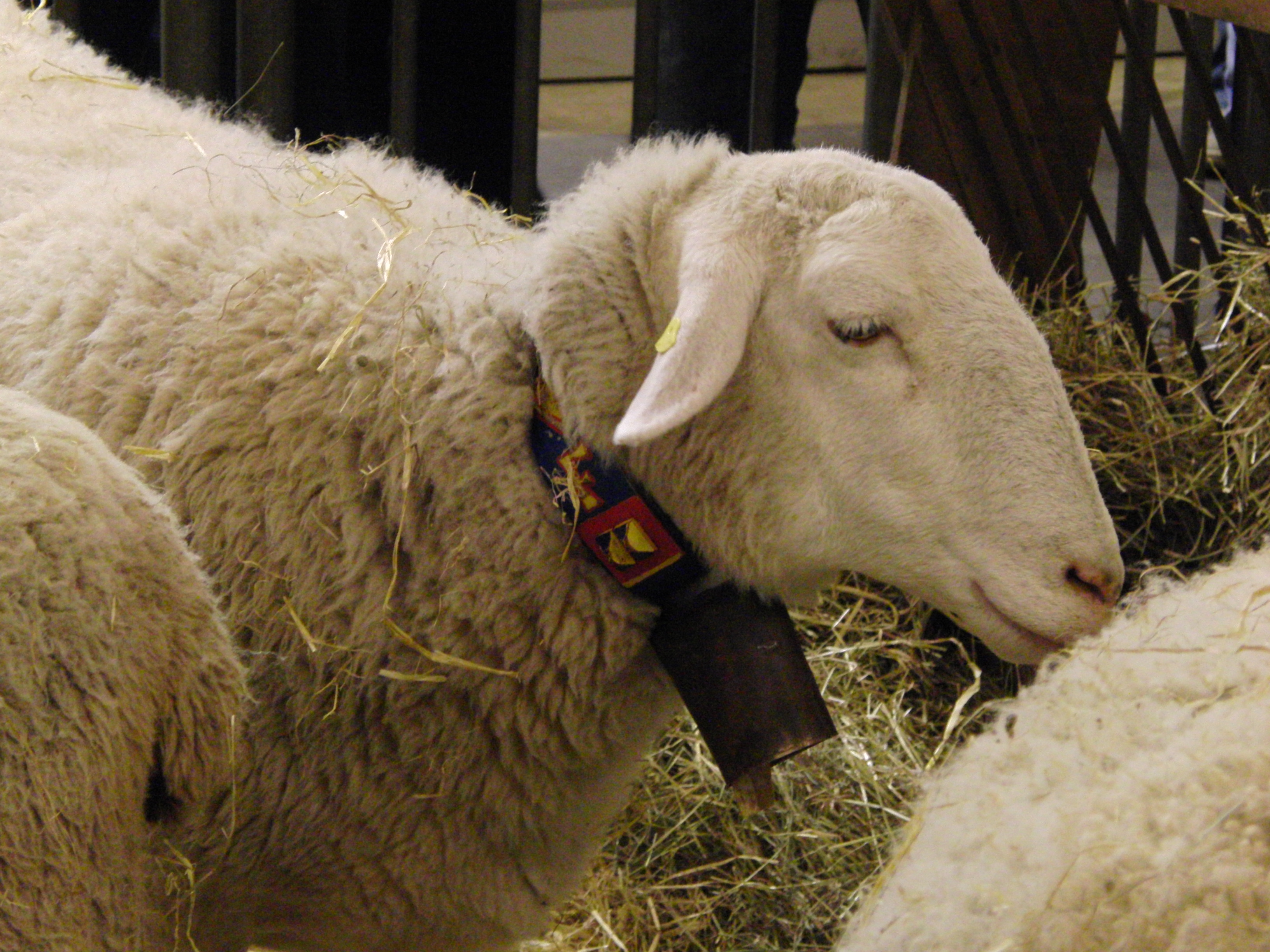 Tête d'une brebis Caussenarde des Garrigues - Salon international de l'agriculture 2013, Paris, France